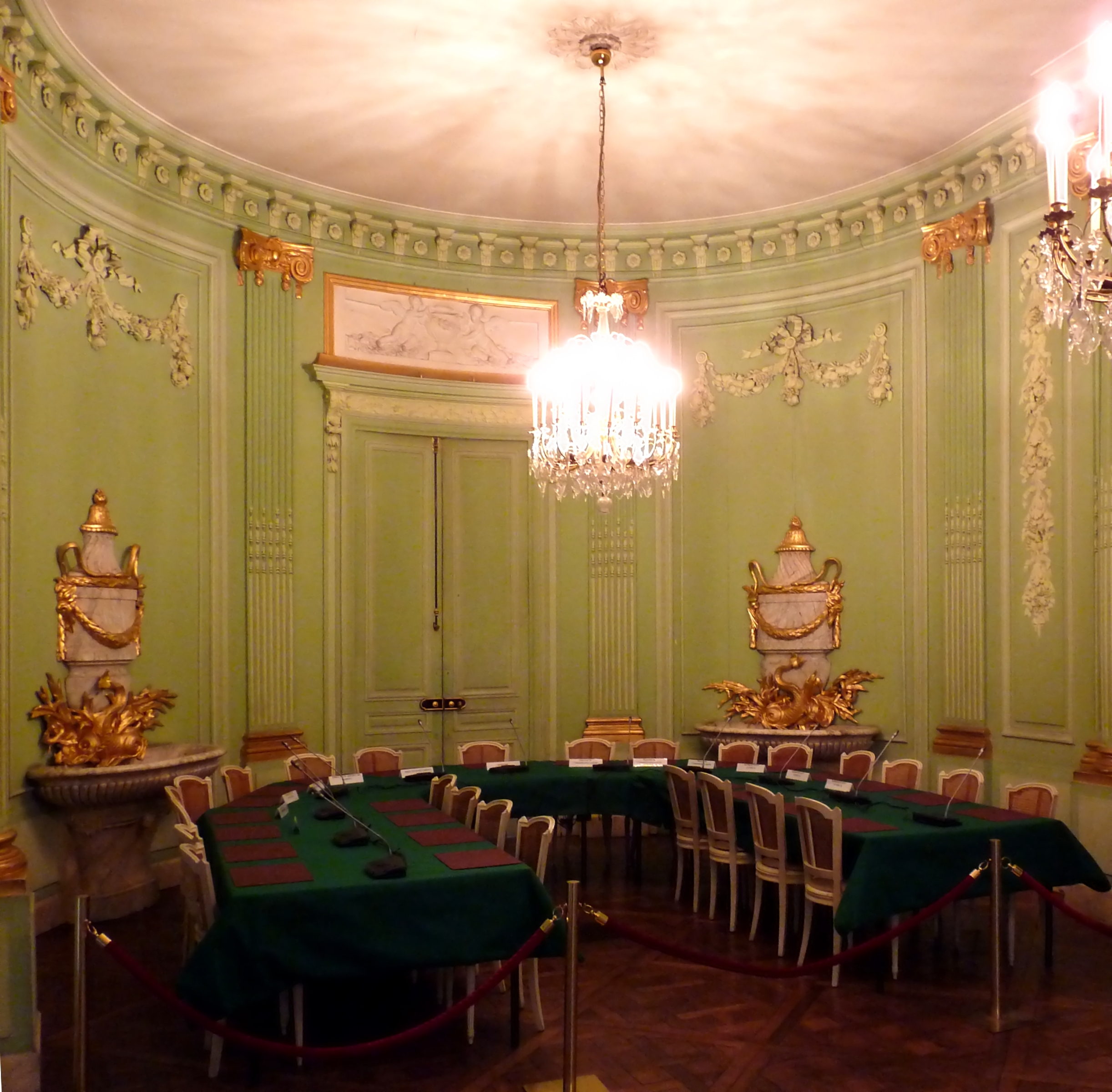 La salle des accords dans l'hôtel du Châtelet, Paris. Photo prise lors des journées du patrimoine 2011.